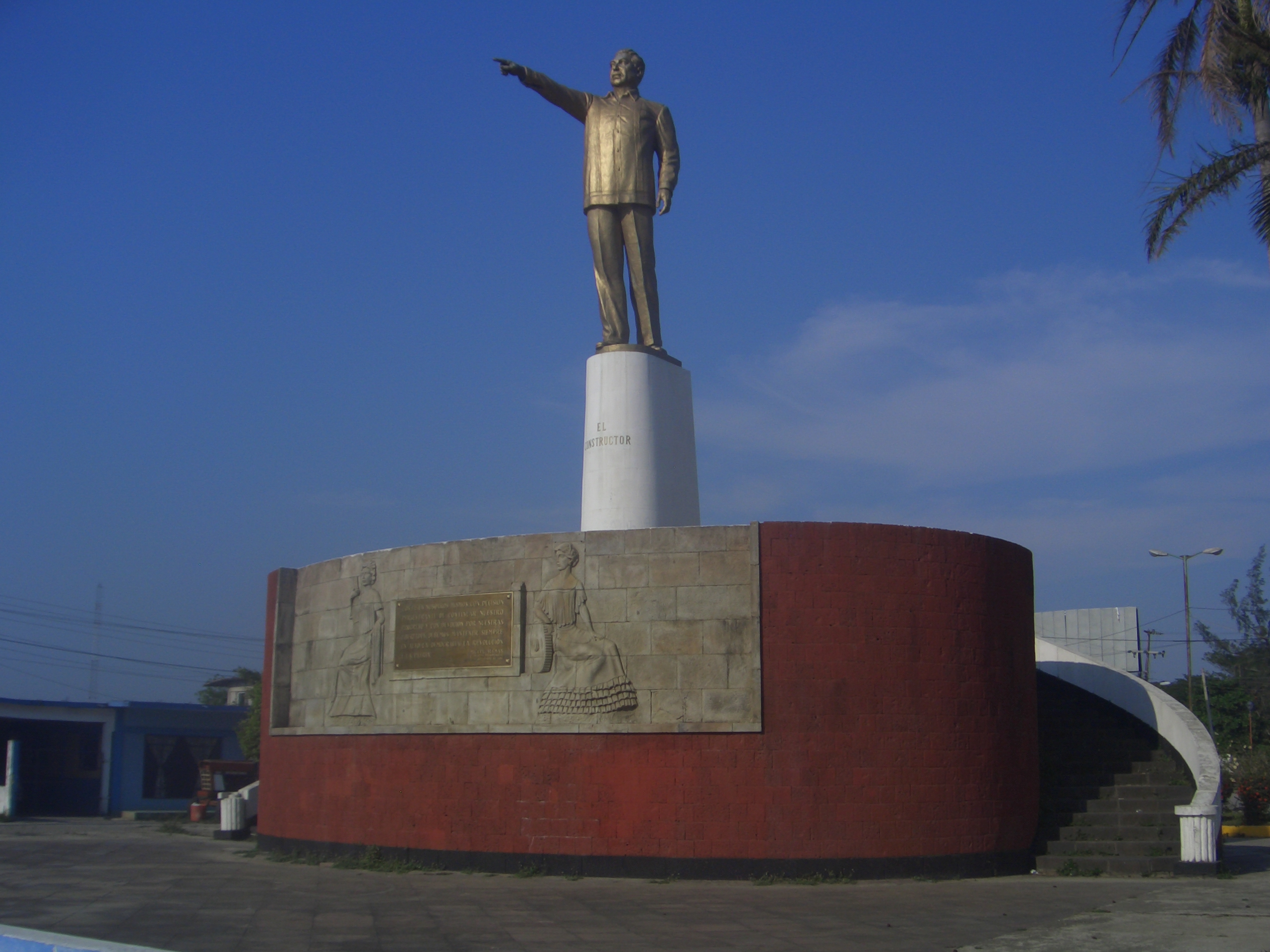 Monumento El Constructor en Carlos A. Carrillo, Ver. 1951.